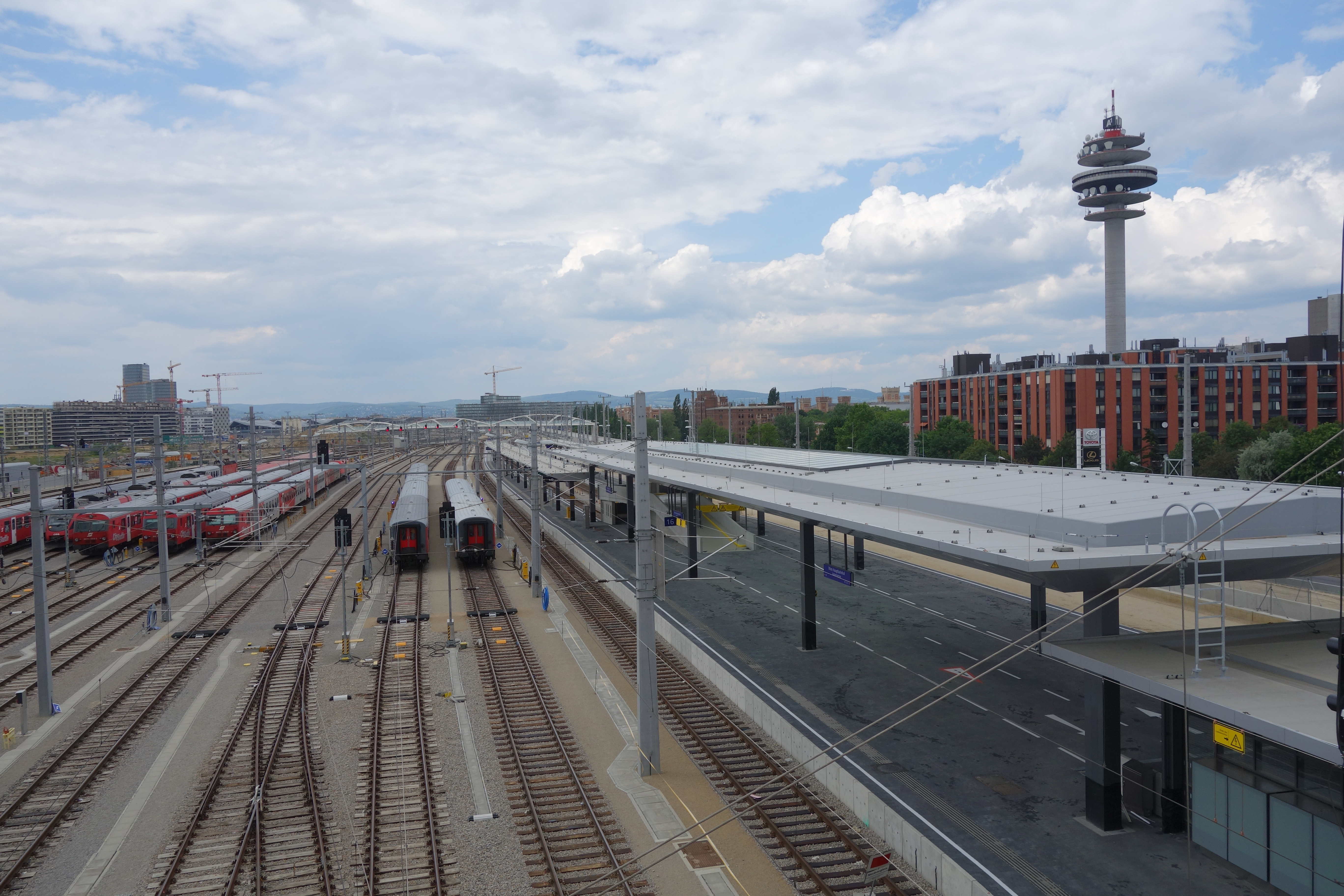 Die Autoreisezuganlage am Wiener Hauptbahnhof im Juni 2014 einige Wochen vor ihrer Inbetriebnahme.